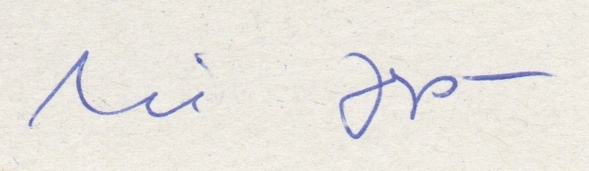 Signatur der Hamburger Bischöfin Maria Jepsen